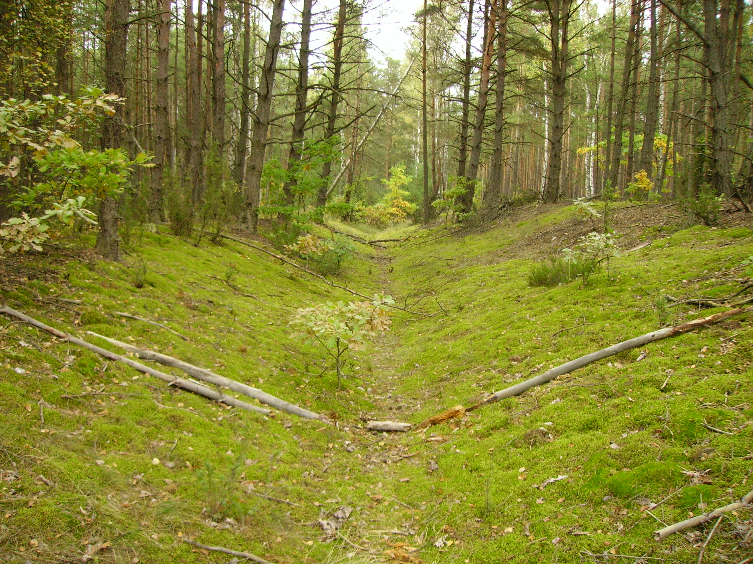 Przedmoście Warszawskie, rów przeciwczołgowy w okolicach Dąbrowieckiej Góry